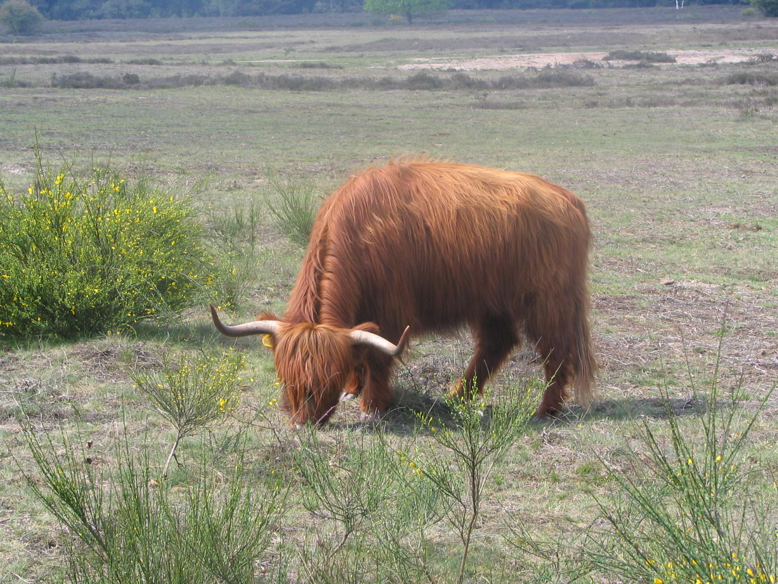 Schotse hooglander; Westerheide bij Hilversum/Laren